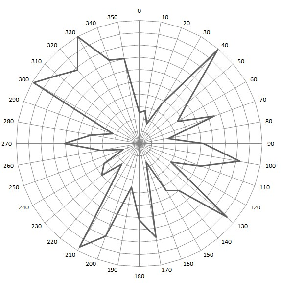 Fictieve pollutieroos aangemaakt in Microsoft Excel